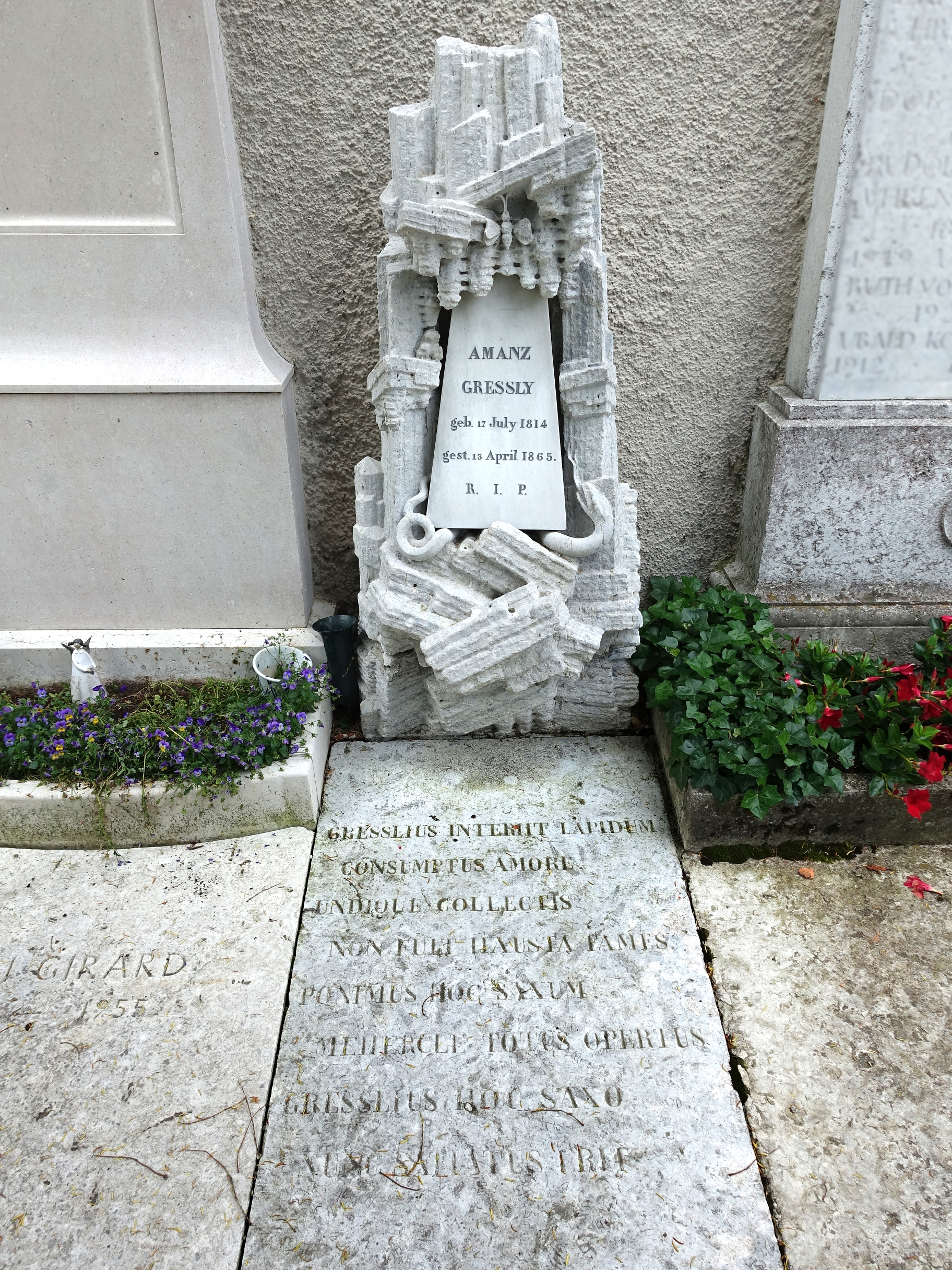 Amanz Grezssly (1814–1865) Geologe, Paläontologe. Grab. Kirche St. Niklaus, Friedhof Feldbrunnen-St. Niklaus, Solothurn.